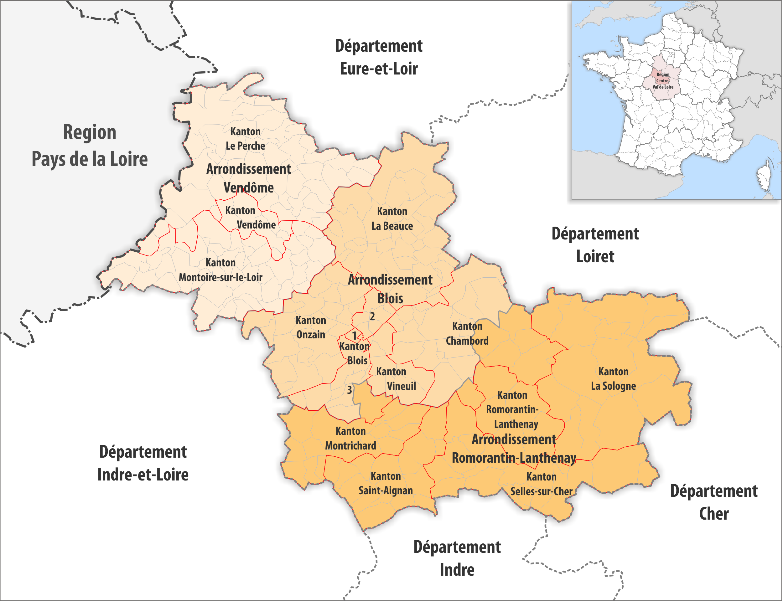 Gemeinden, Kantone und Arrondissemente im Departement Loir-et-Cher